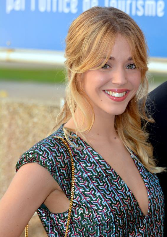 Alice Isaaz au festival de Cabourg